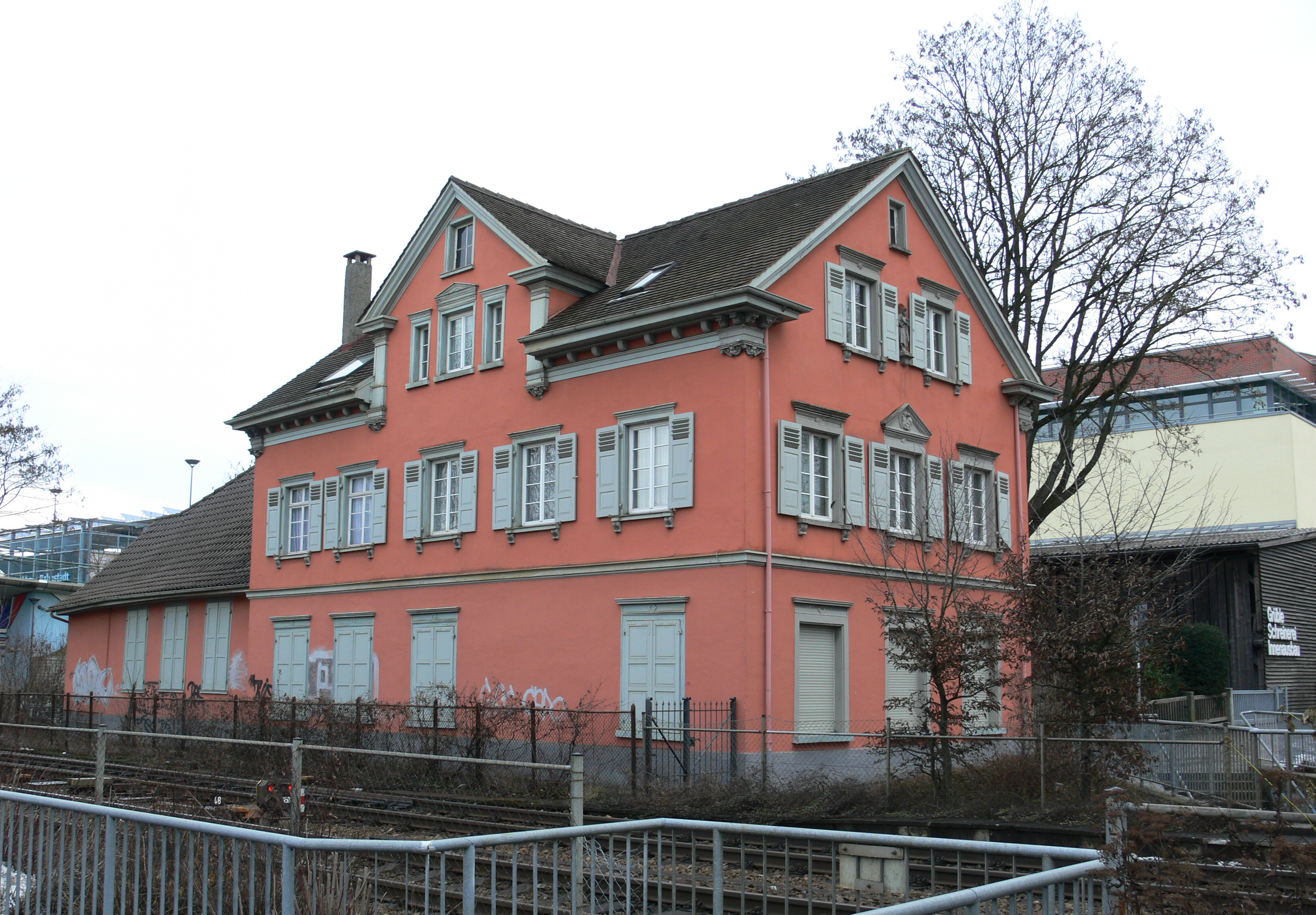 Ravensburg, Pfannenstiel: Ehemaliges „Atelier für Christliche Kunst“ von Theodor Schnell d. Ä., später Theodor Schnell d. J., Zustand 2006